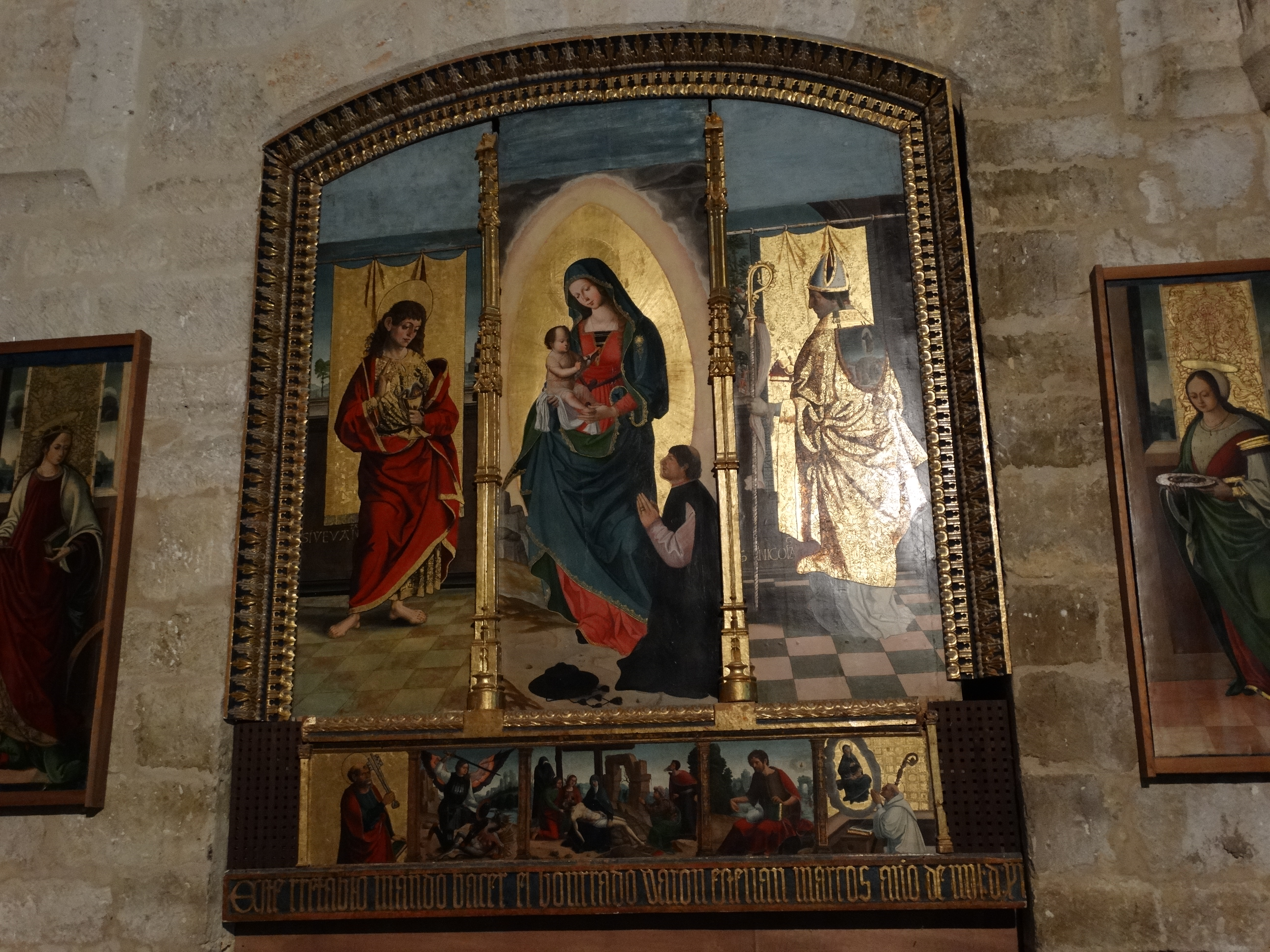 Torremormojón, provincia de Palencia, España. Iglesia de Santa María del Castillo. Retablo del maestro Calzada.